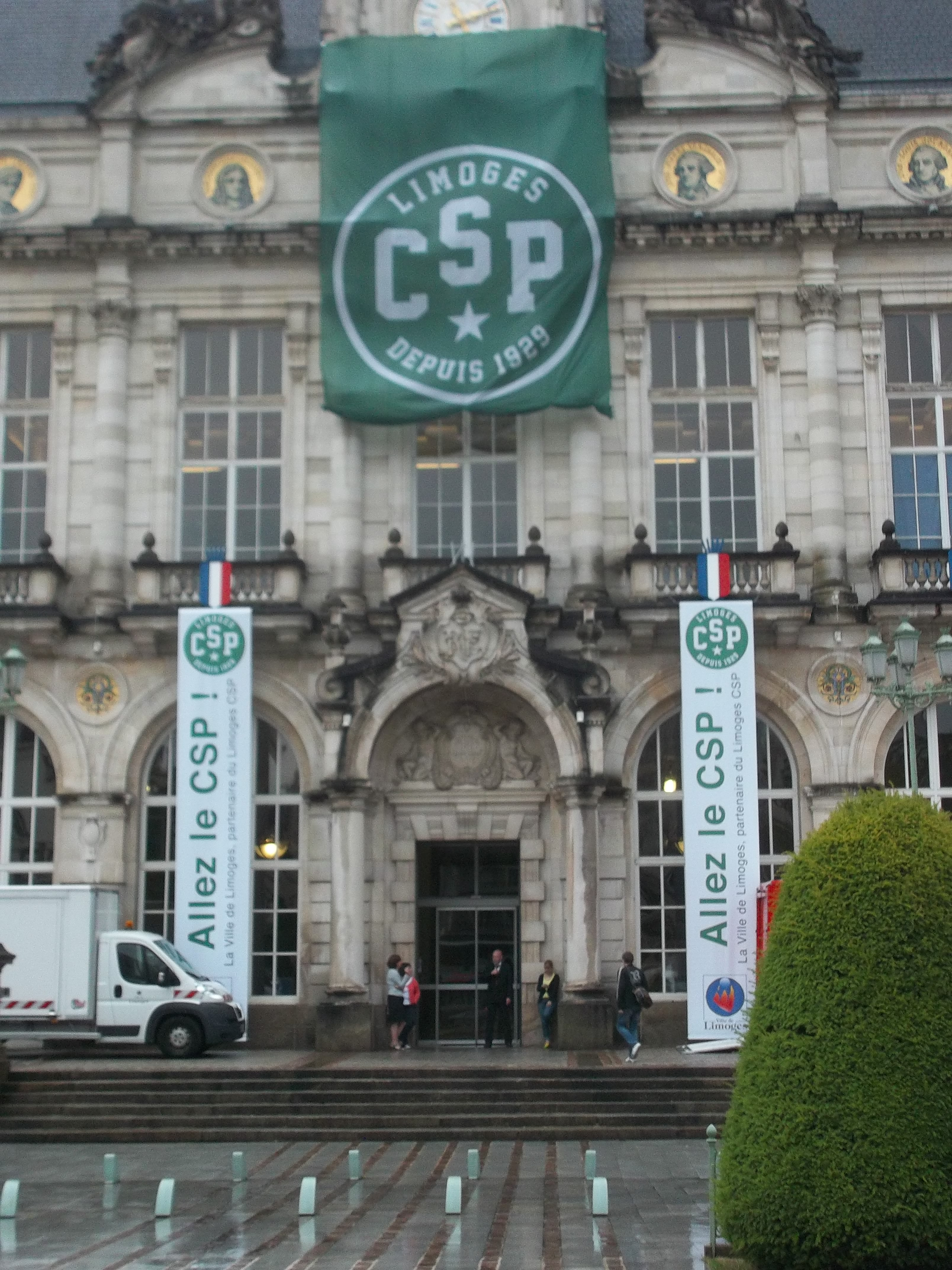 2014-2015, 10 juin 2015, La Municipalité s'habille aux couleurs du Limoges CSP